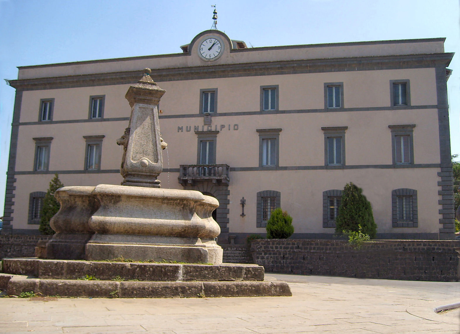 Palazzo comunale di Castel Giorgio.